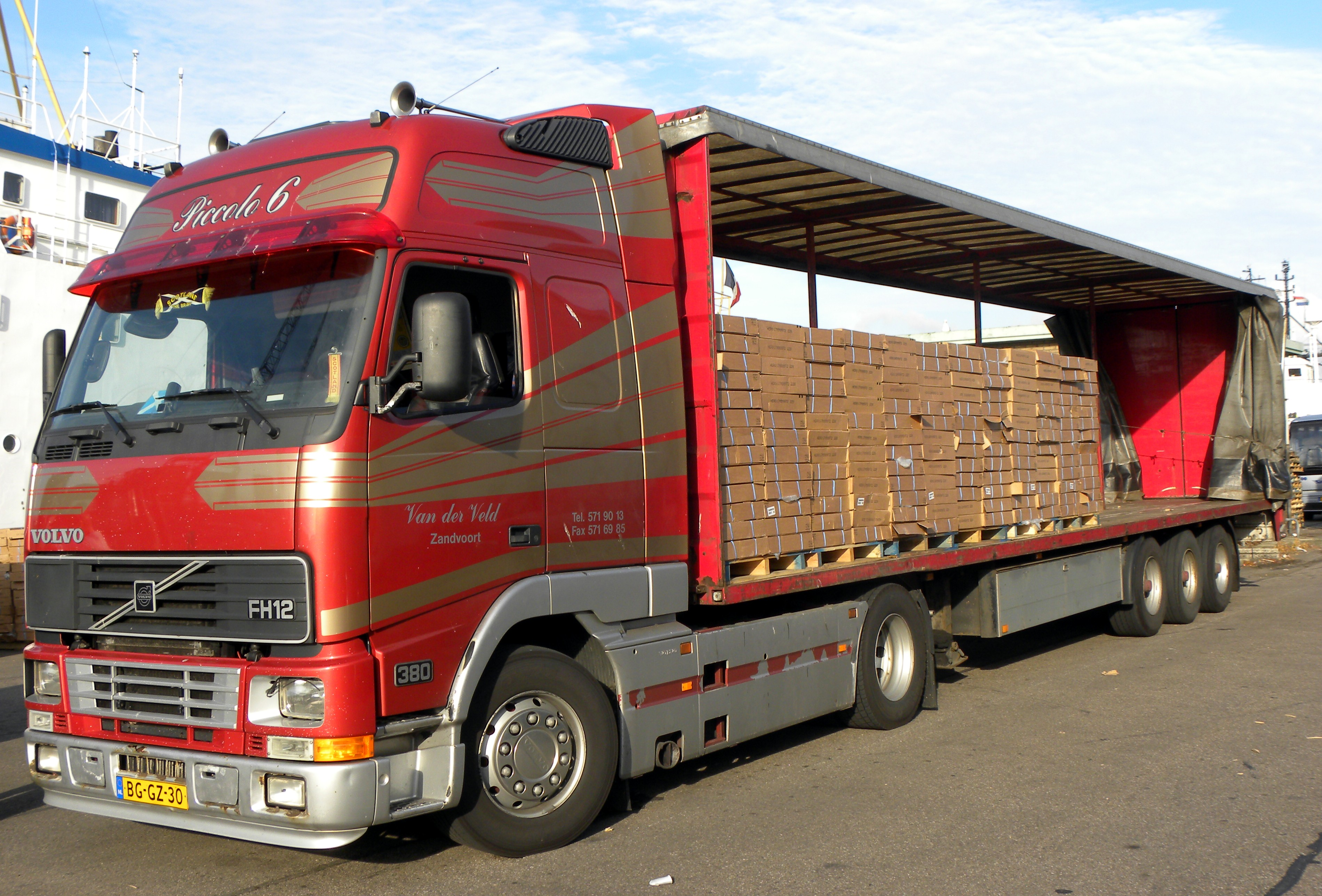 Volvo FH12 380 from Van de Veld Zandvoort.